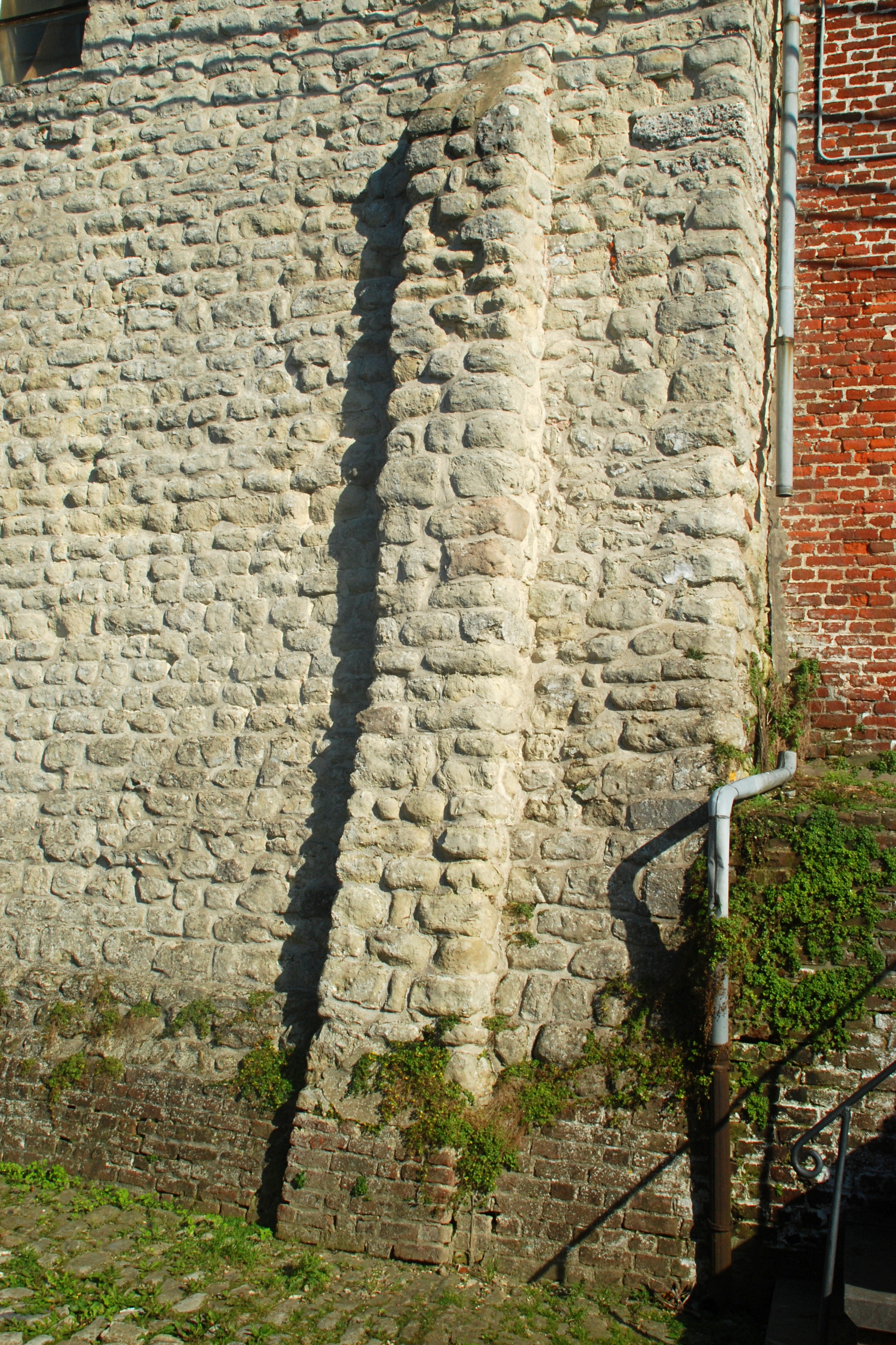 Belgique - Brabant wallon - Nivelles - Eglise Sainte-Marguerite de Thines